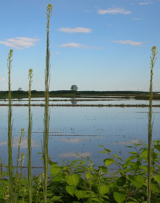 Rijstvelden in de omgeving van Vercelli Risaie in provincia di Vercelli.